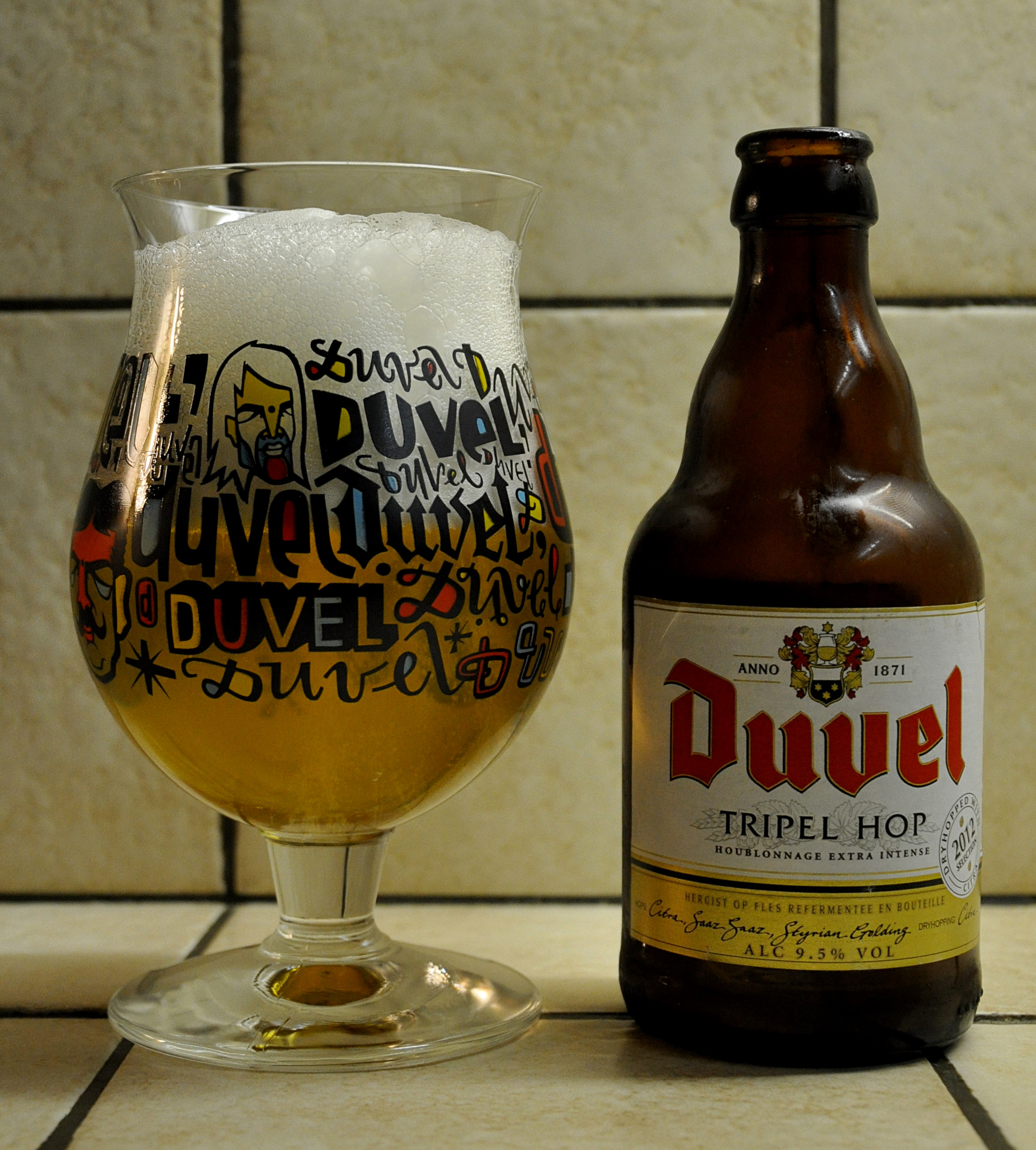 Duvel Tripel Hop 2012; Duvel glas ontworpen door Denis Meyers